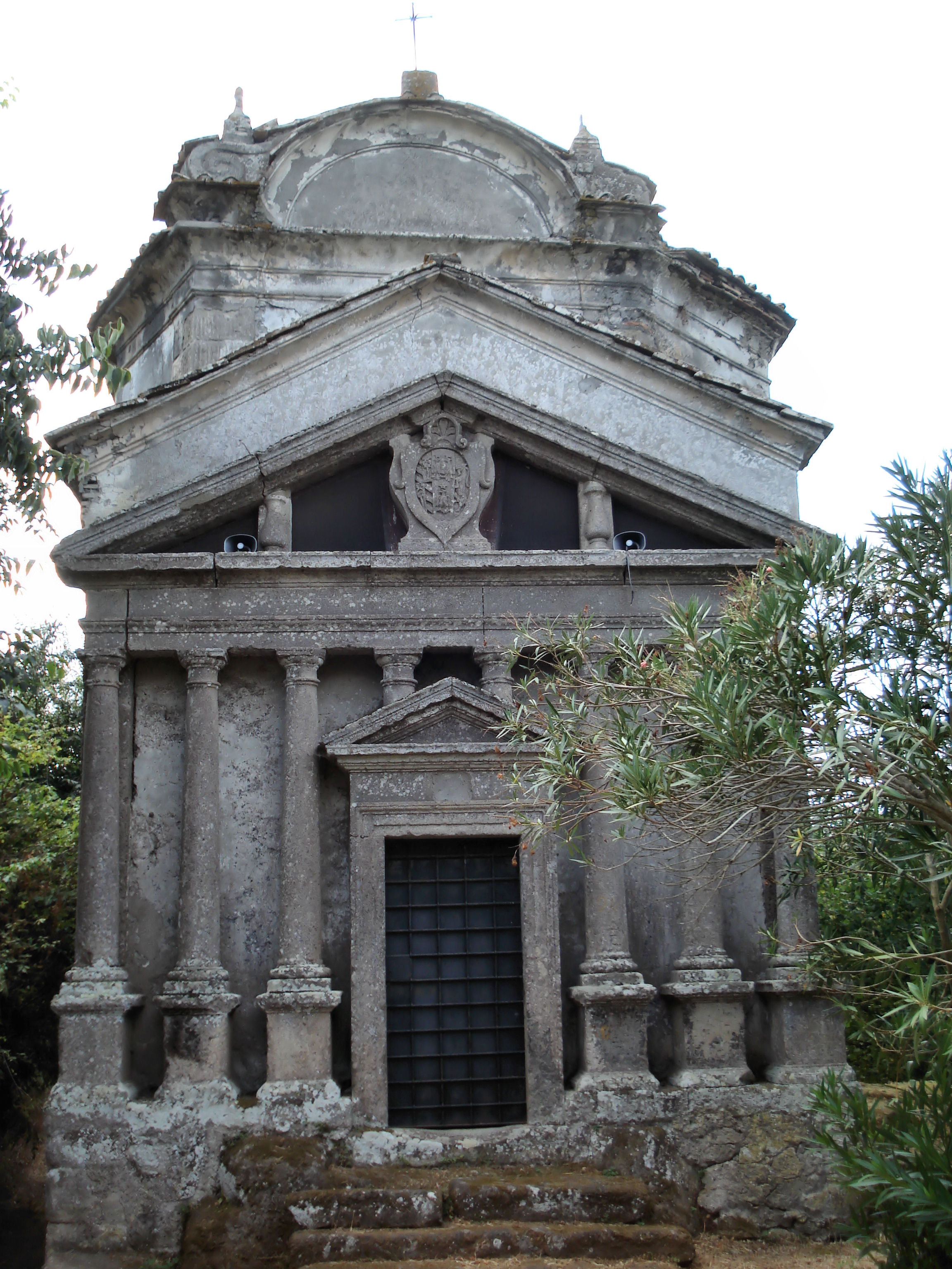 Cosmin latan,Chiesa di Santa Maria della Valle